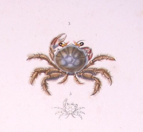 Dynomène de Latreille (Dynomene hispida)